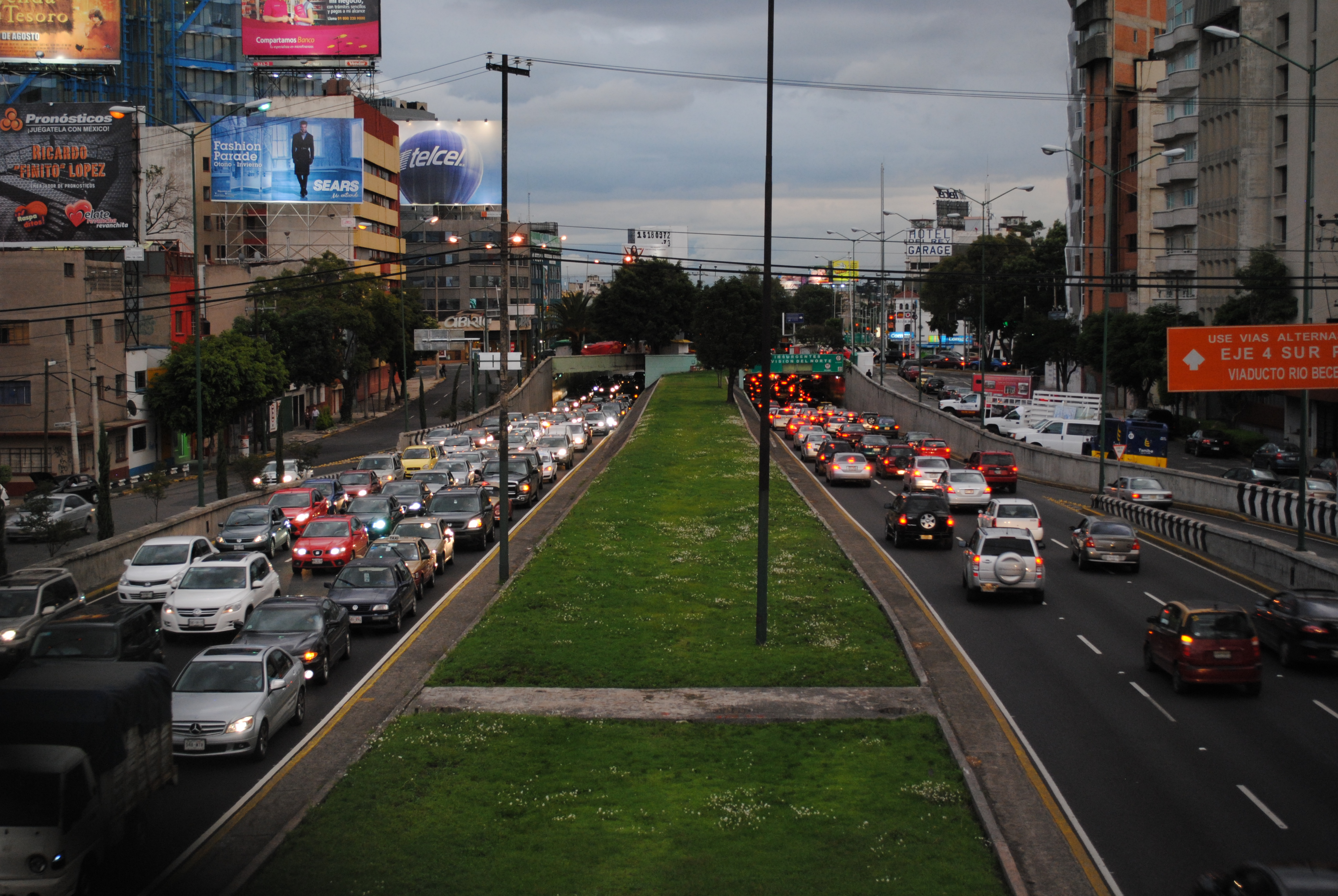 Viaducto Río de la Piedad, a la altura de Insurgentes, Ciudad de México.